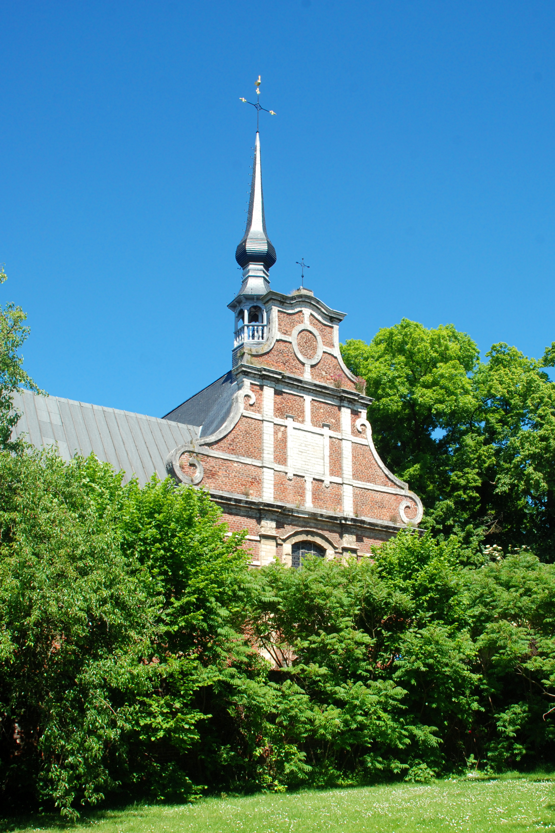 Belgique - Brabant flamand - Louvain (Leuven) - Chapelle des Sœurs Noires (Zwartzusterskapel)